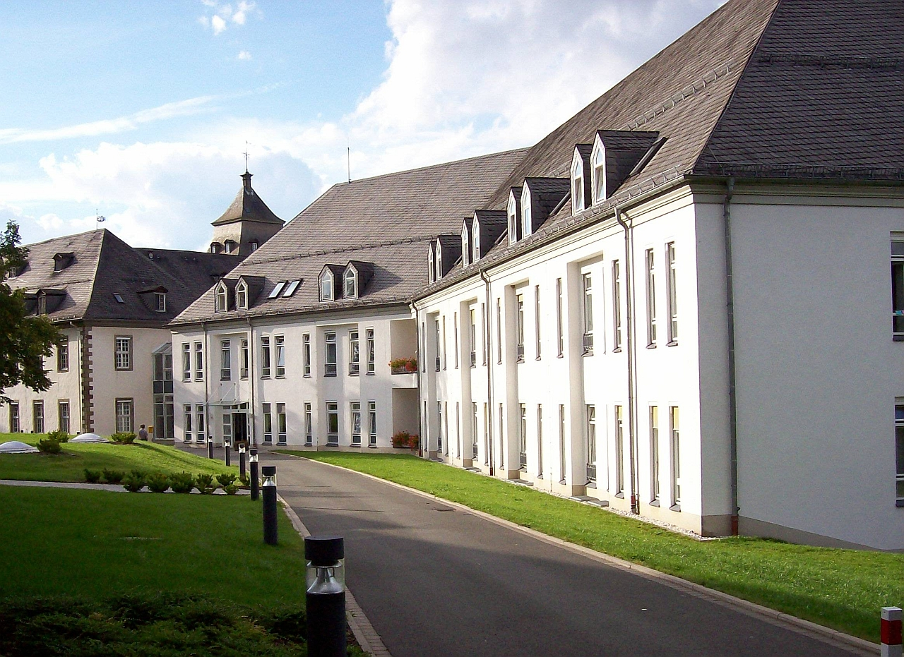 Eingang Fachkrankenhaus Kloster Grafschaft (Germany)